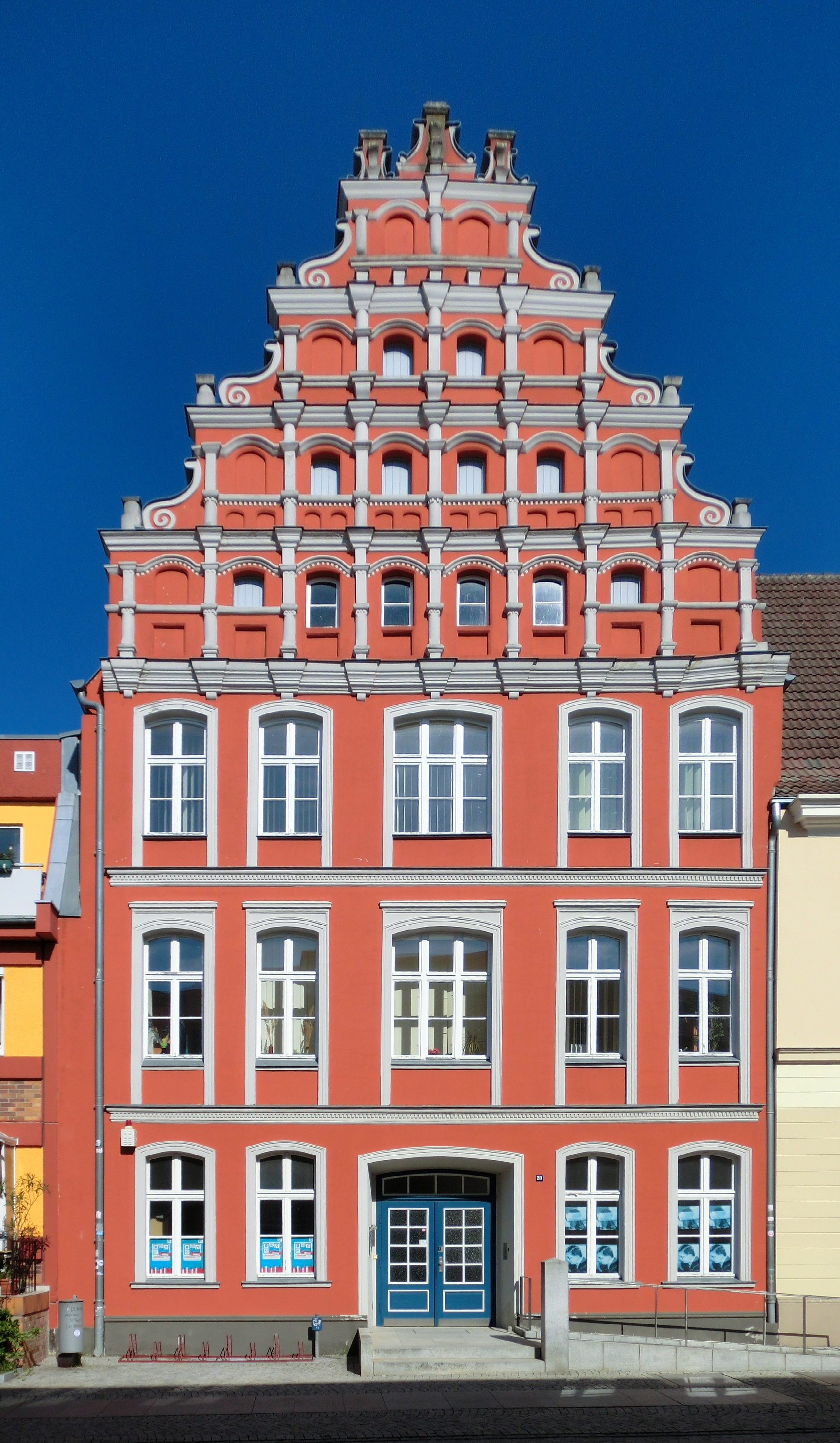 Greifswald, Bibliothek, Knopfstrasse 20, Baudenkmal